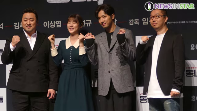 elenco y director de The Villagers